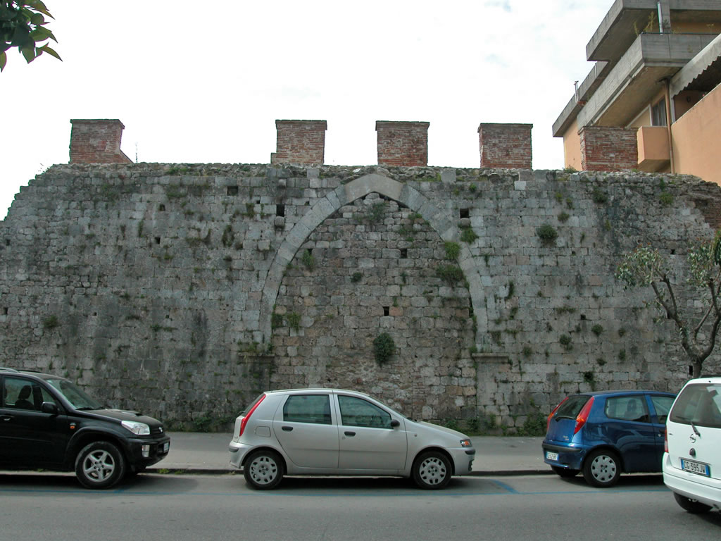 La porta di San Martino in Guatolongo in Via Benedetto Croce a Pisa.